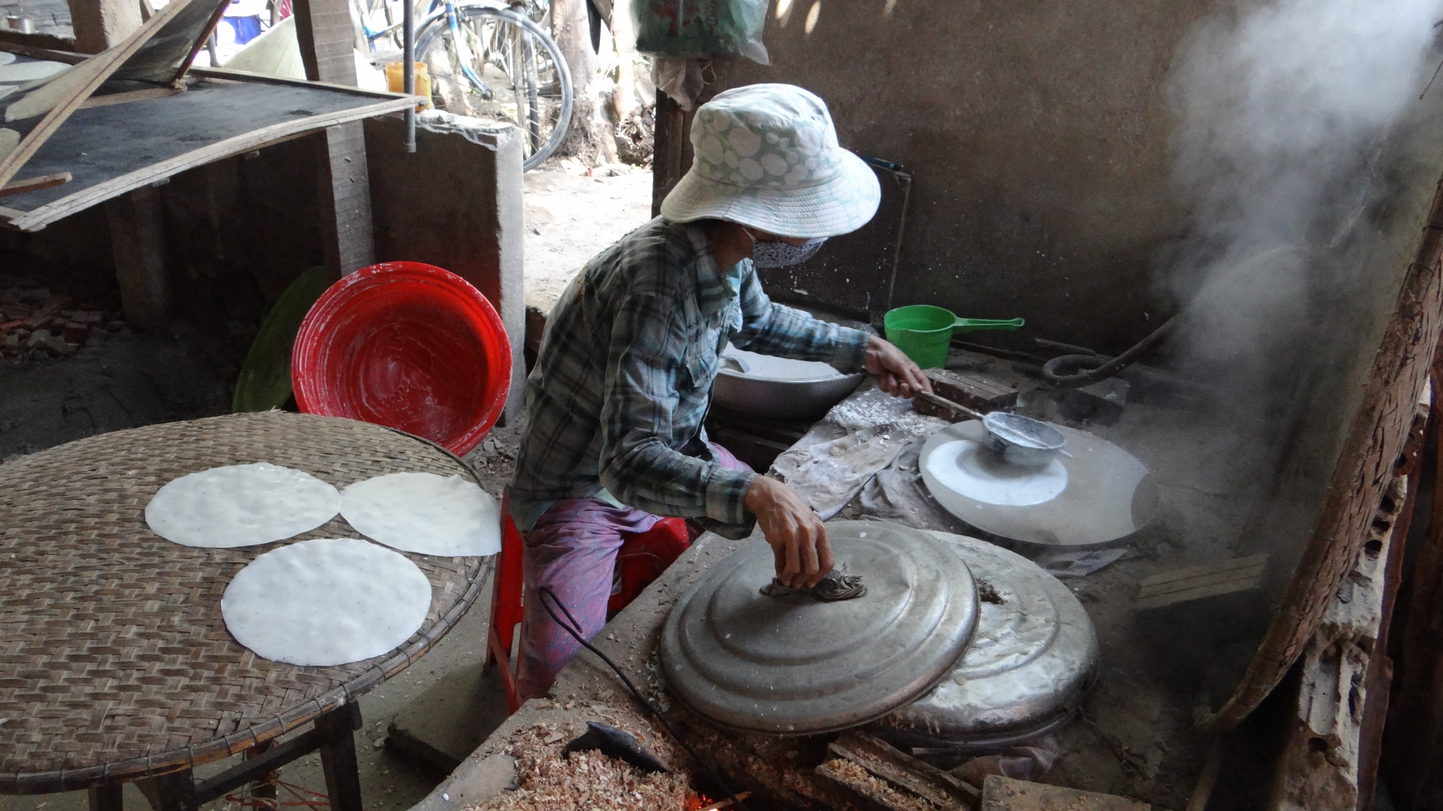 fabrication Traditionnelle de galette de riz à An Hoi islet au Vietnam